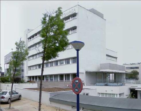 Sede central de Egmasa. Sevilla. Andalucía, España.